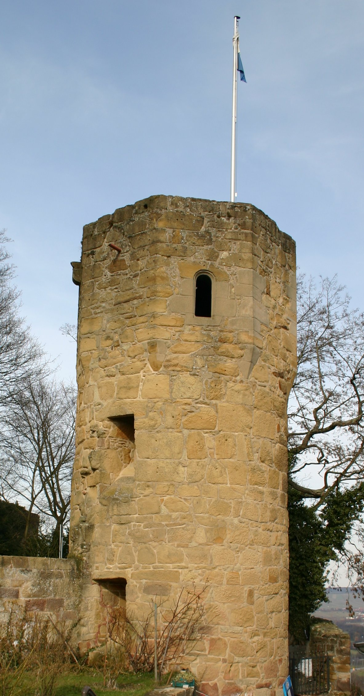 Weinsberg, Burgruine Weibertreu, Turm